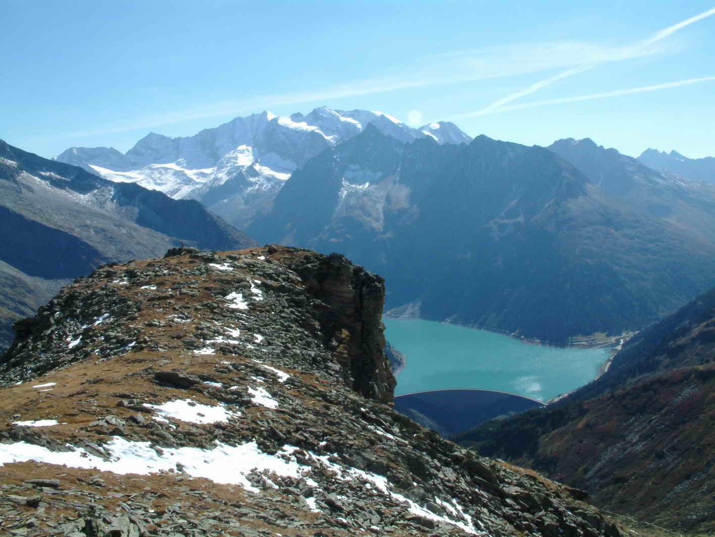 Hochfeiler a přehrada Schlegeis speicher